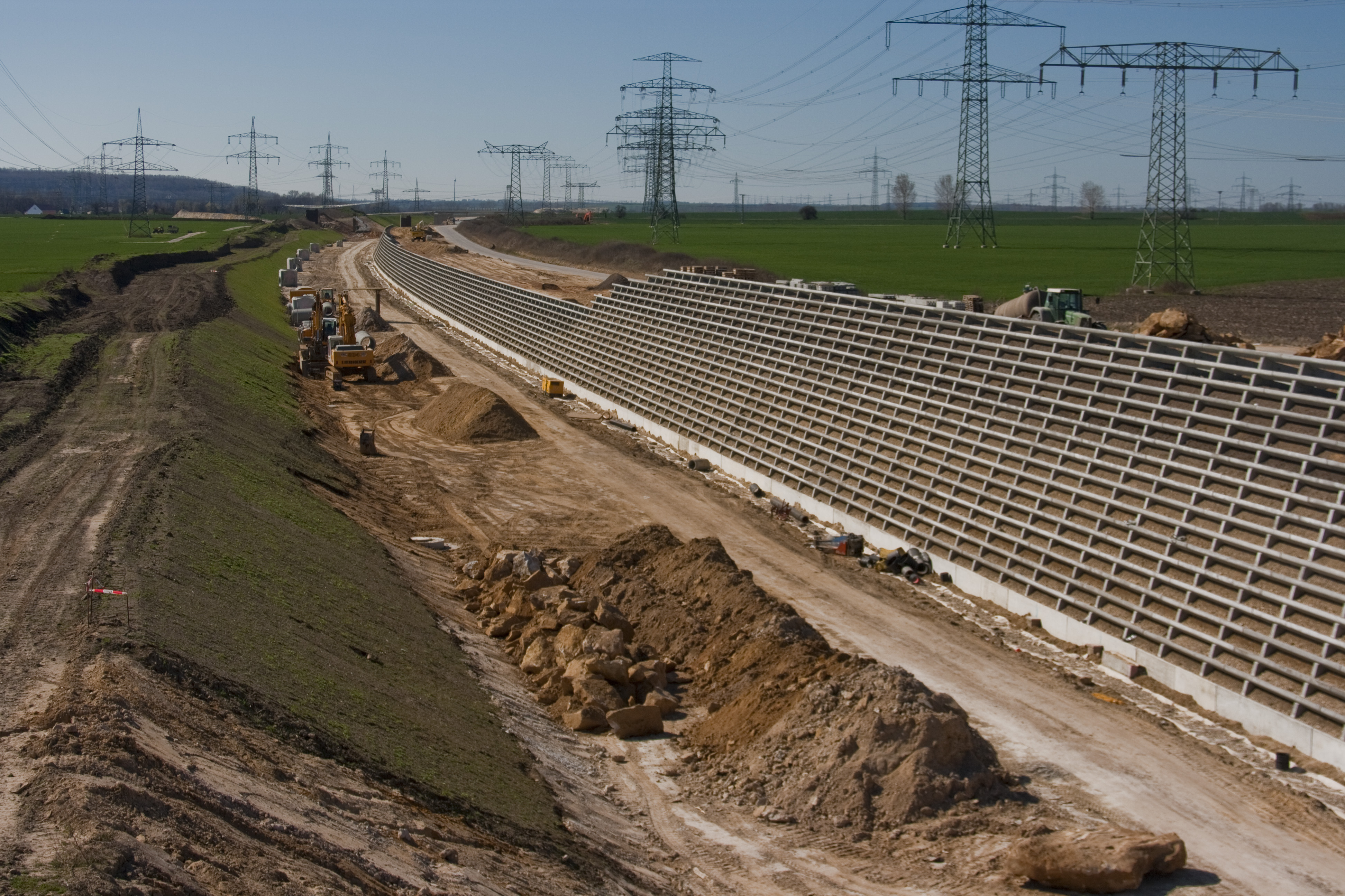 Neubaustrecke Erfurt - Leipzig-Halle - NBS km 267, Nähe Bad Lauchstädt